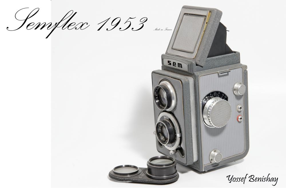 semlex